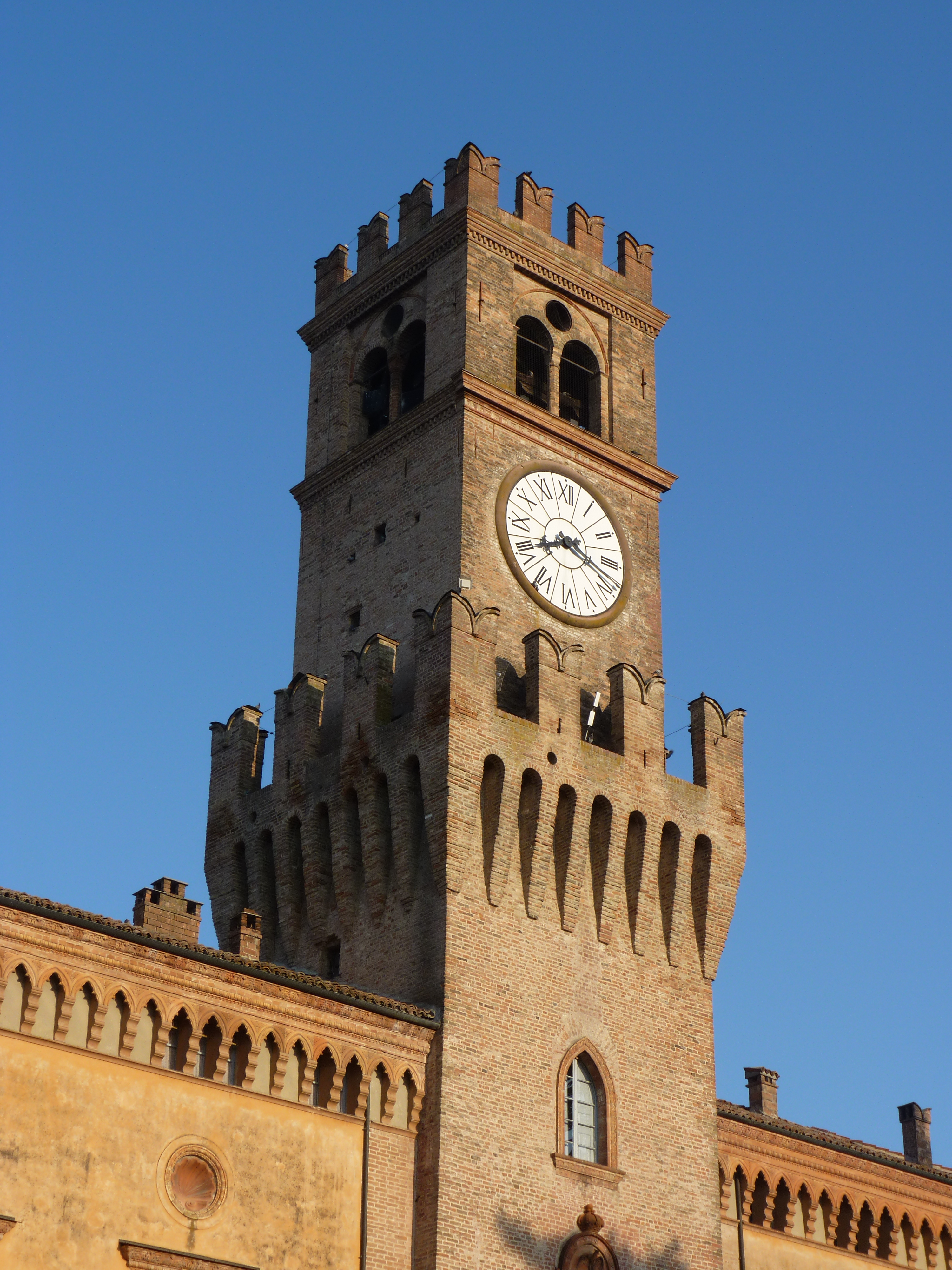 Rocca Pallavicino This is a photo of a monument which is part of cultural heritage of Italy.